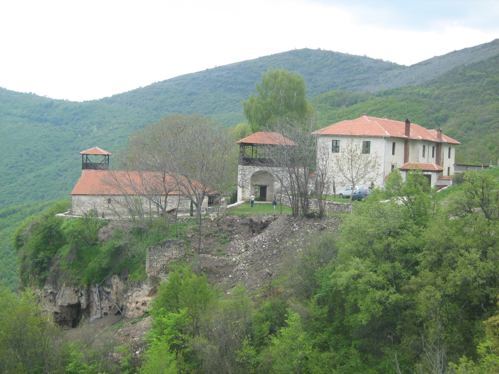 Zrze Monastery